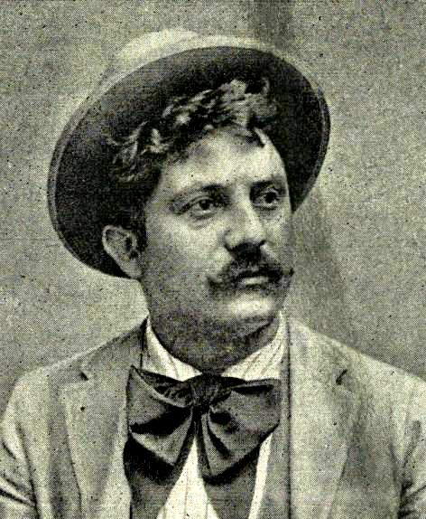 Fotografia che ritrae il volto di Giggi Zanazzo